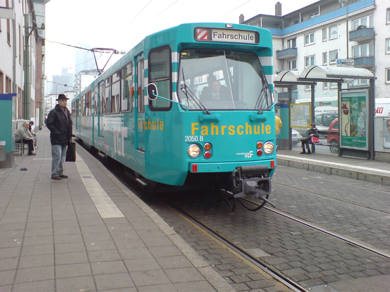 Pt-Wagen 2050 (Fahrschule), Boerneplatz, Frankfurt am Main